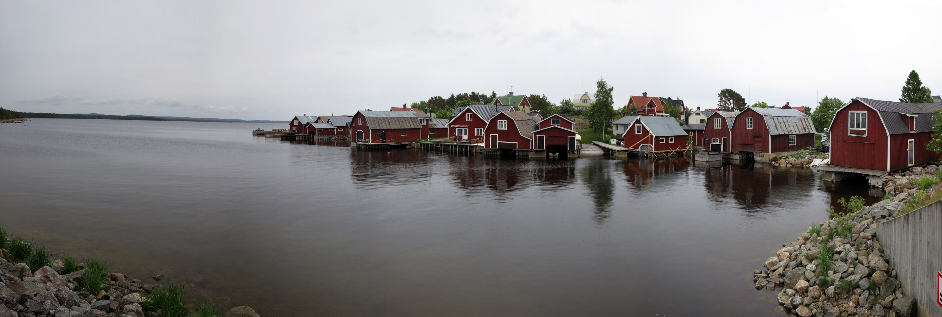 Ön Rönnskär i Hälsingland ligger vid kusten utanför Stocka